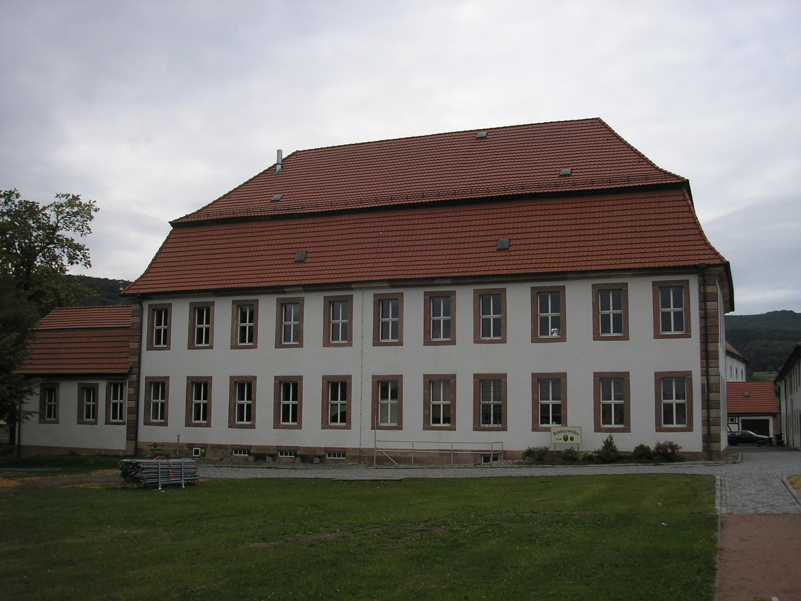 Rückansicht des Schlosses in Dermbach (Thüringen).